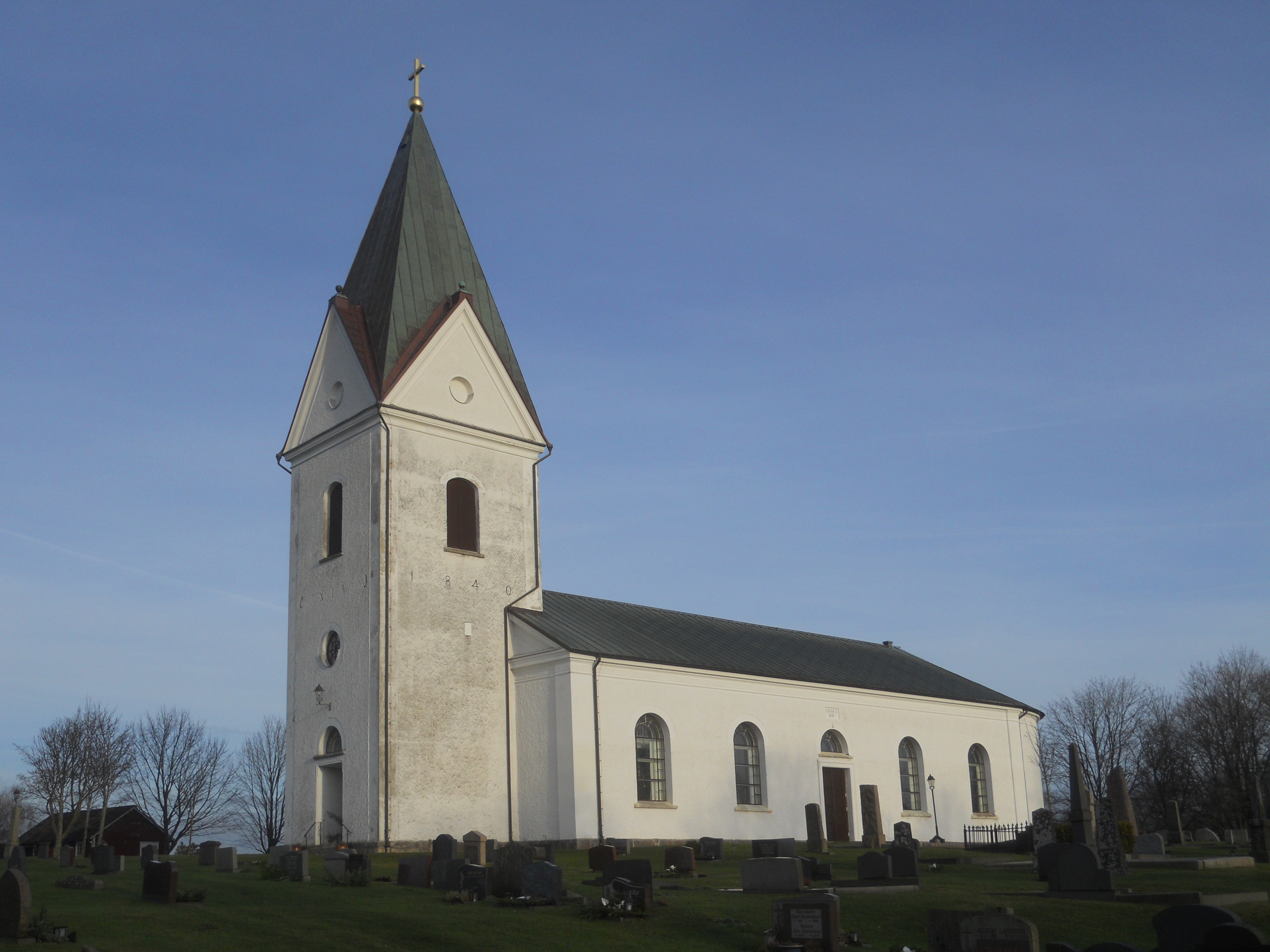 Valinge kyrka, Varberg.